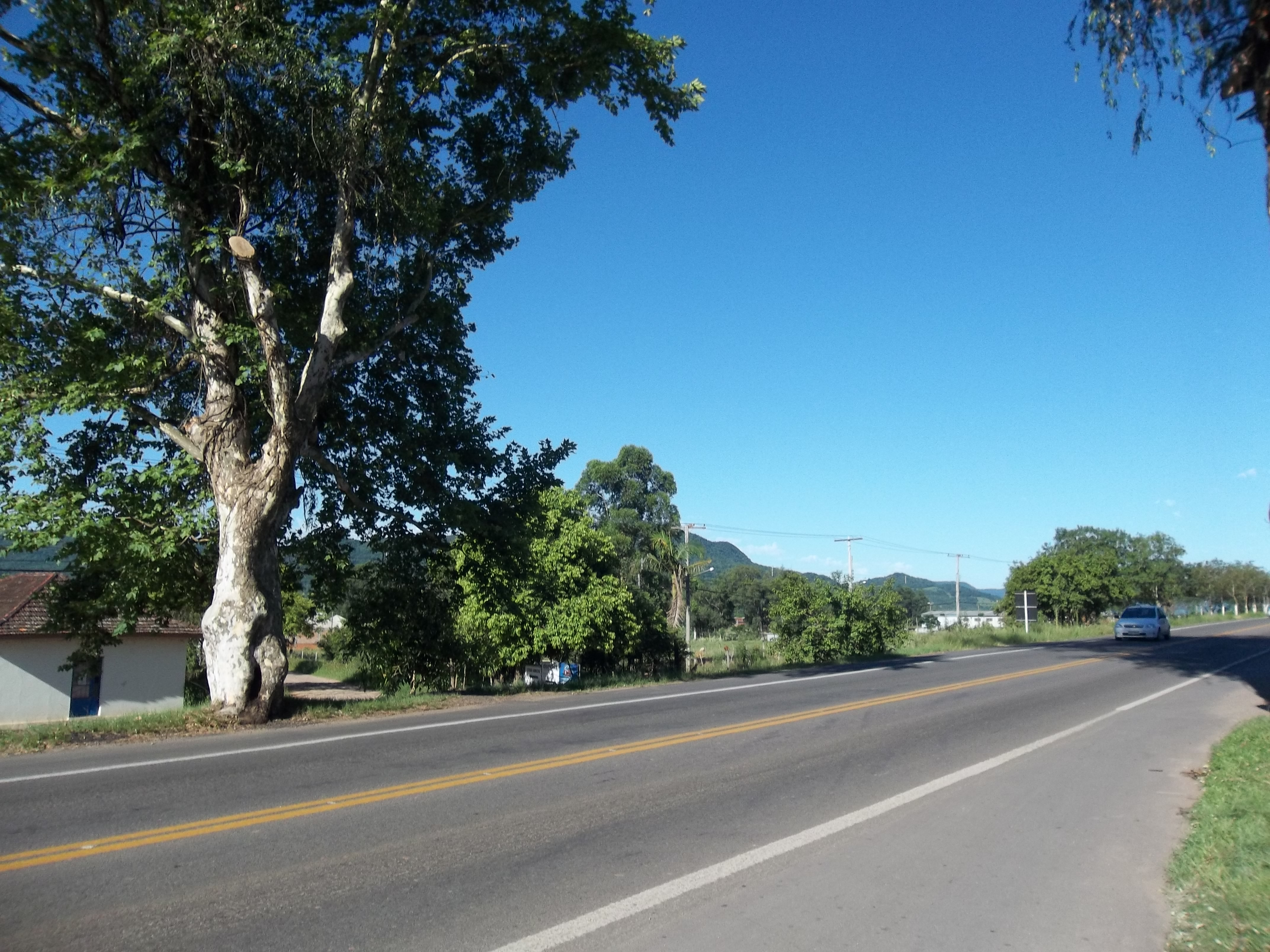 RS-509, Pé de Plátano, Santa Maria, RS, Brasil